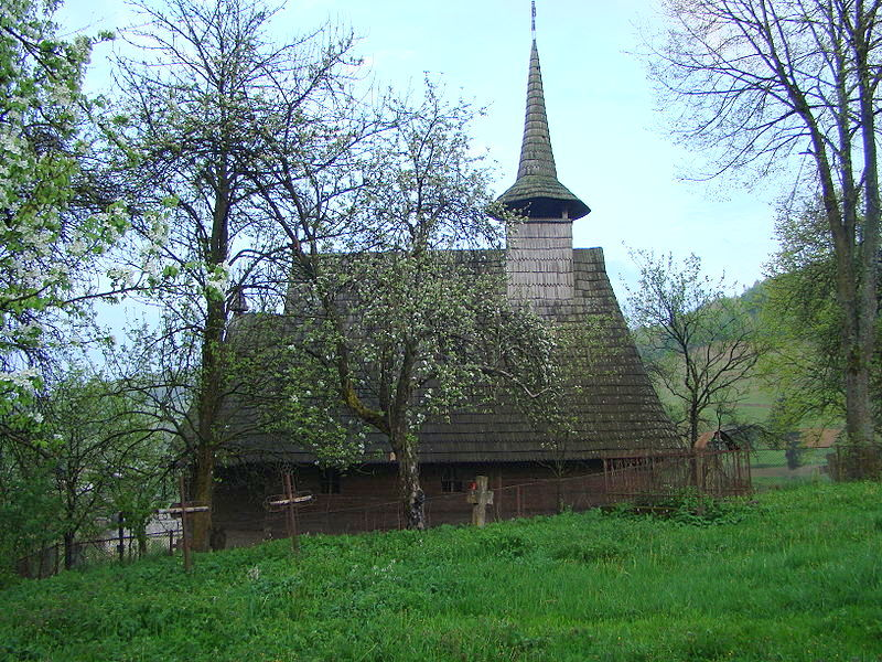 Biserica de lemn "Sfântul Dumitru", sat LARGA; comuna SUCIU DE SUS